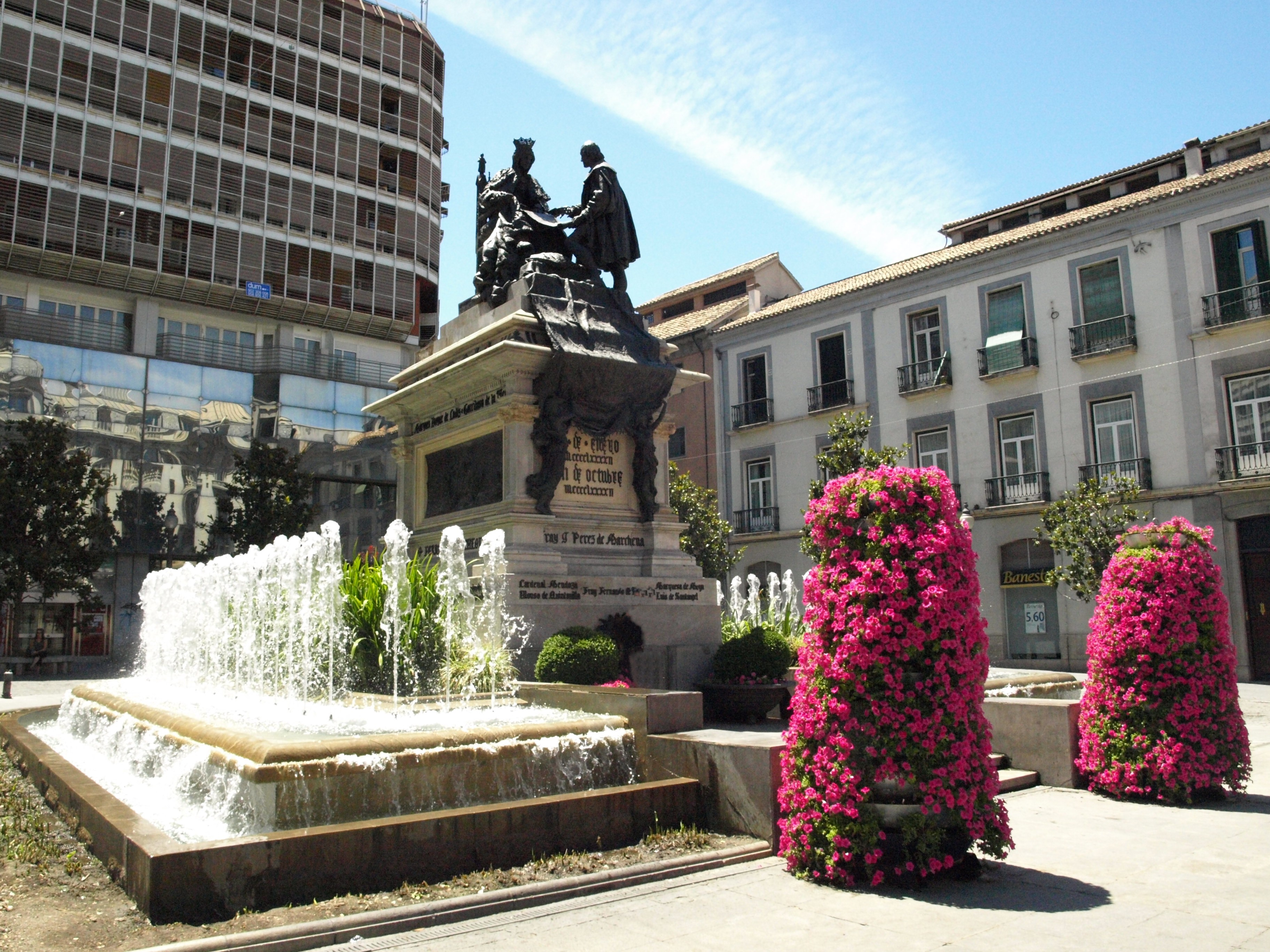 Estatua de Isabel la Católica recibiendo a Cristobal Colón en la Plaza Isabel la Católica de Granada (España)